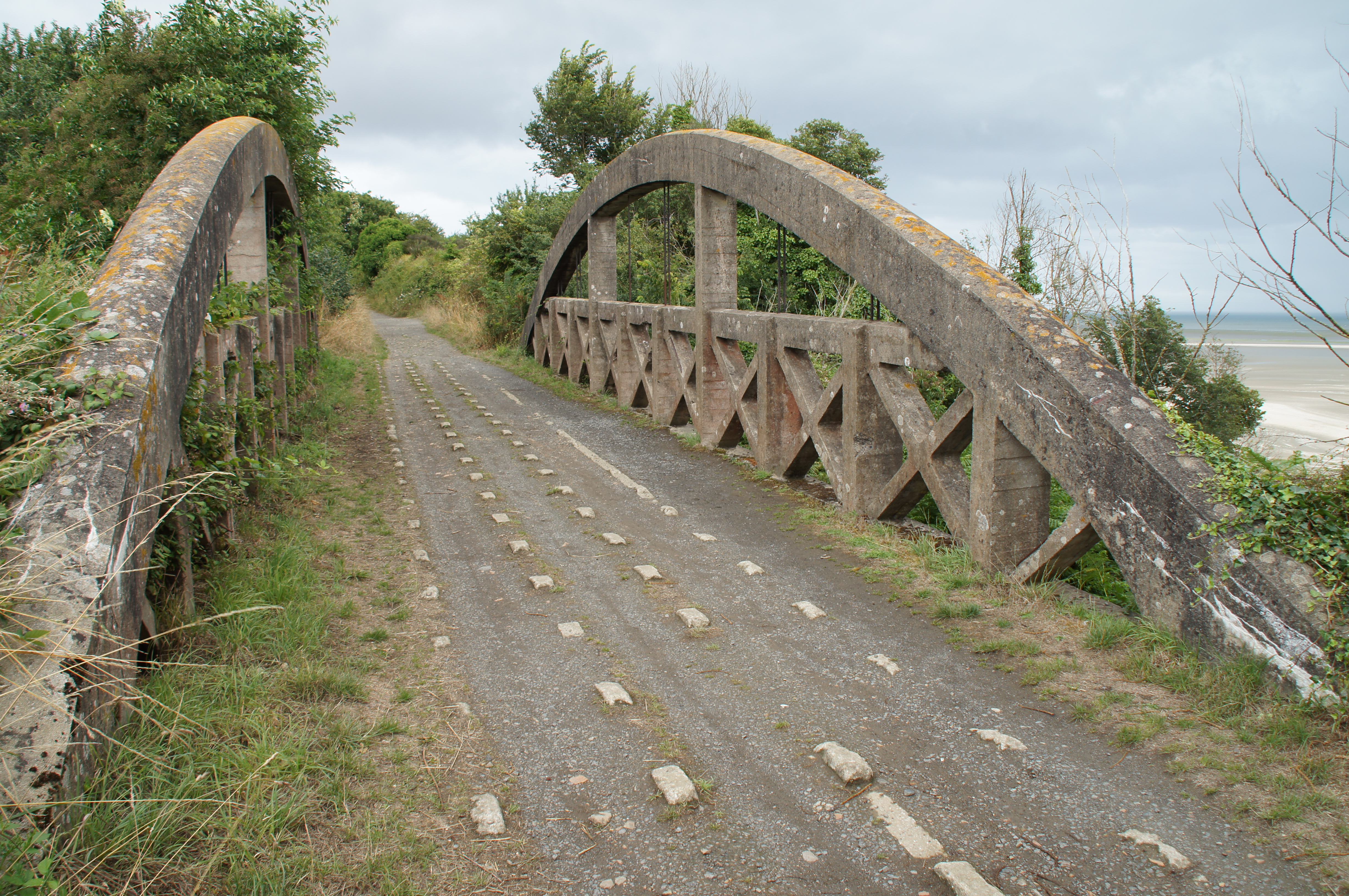 Pont de la Cage, Zustand 2015